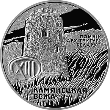 Беларуская (тарашкевіца): Манэта "Камянецкая вежа"